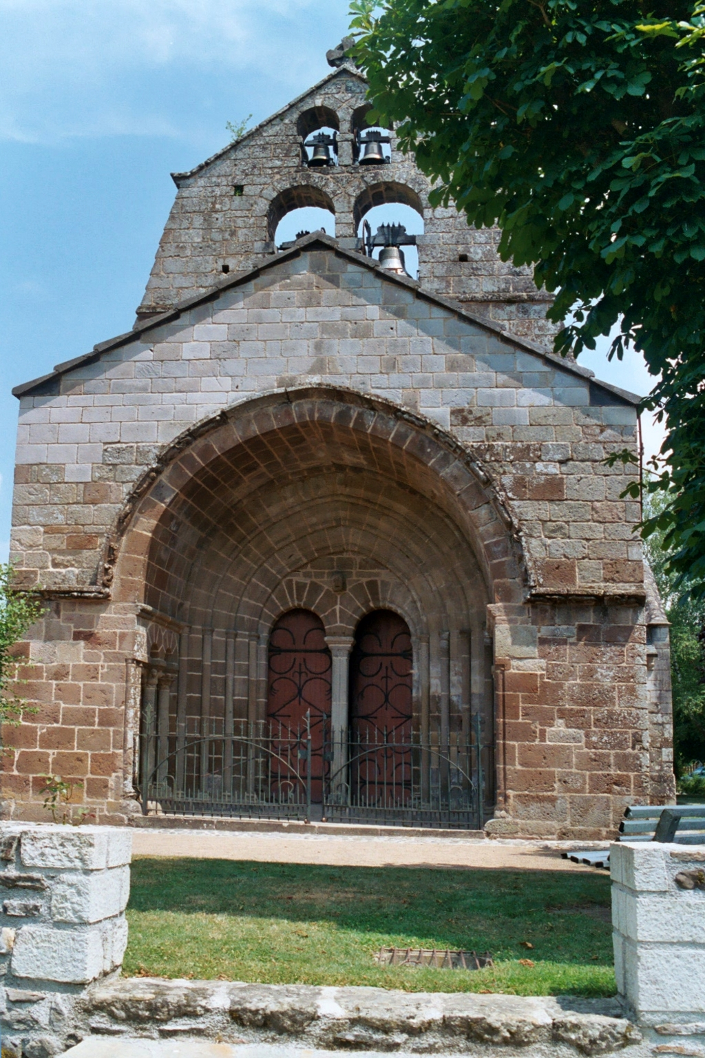 France - Auvergne - Cantal - Église Saint-Georges d'Ydes-Bourg